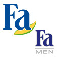 Fa brand logo displayed at the left and the subbrand Fa Men displayed at the right